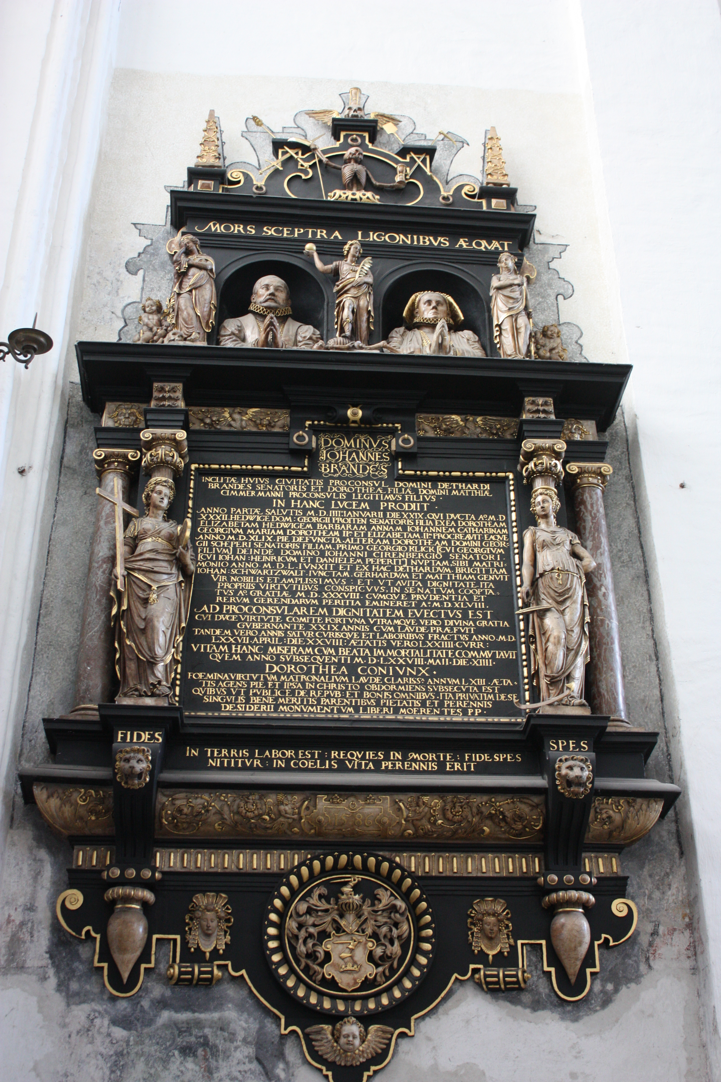 Gdańsk, kościół par. p.w. Wniebowzięcia NMP, tzw. Mariacki, 1343, 1502, po 1945